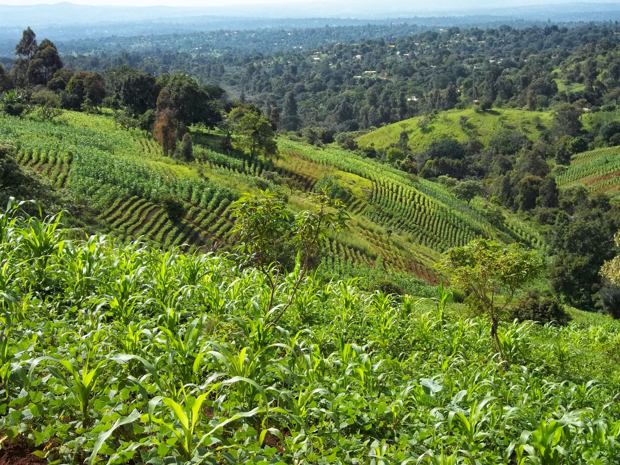 Bamougong est une savane herbacée par endroit